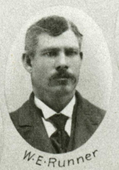 Rep WE Runner